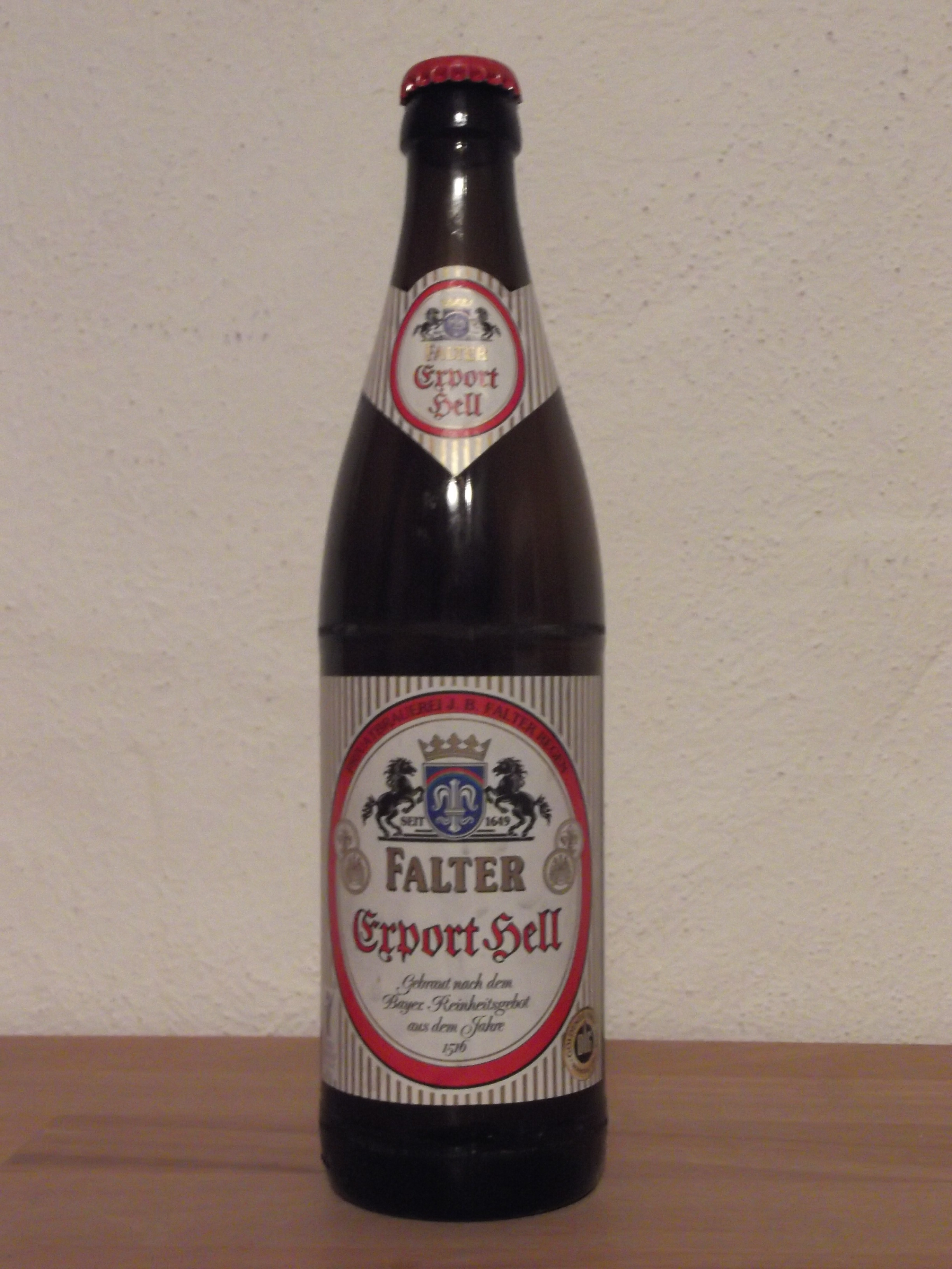 Flaschenabfüllung 0,5l